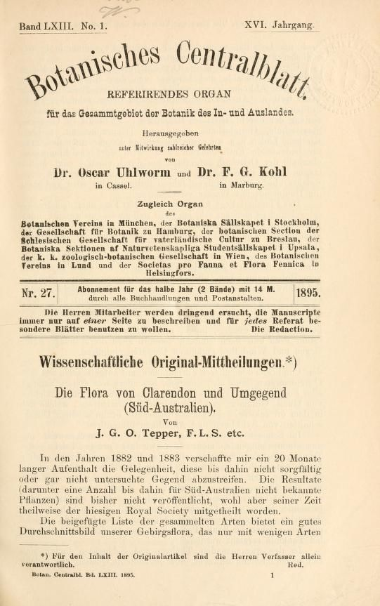 Botanisches Centralblatt 1895 Johann Gottlieb Otto Tepper: Die Flora von Clarendon und Umgegend (Süd Australien)